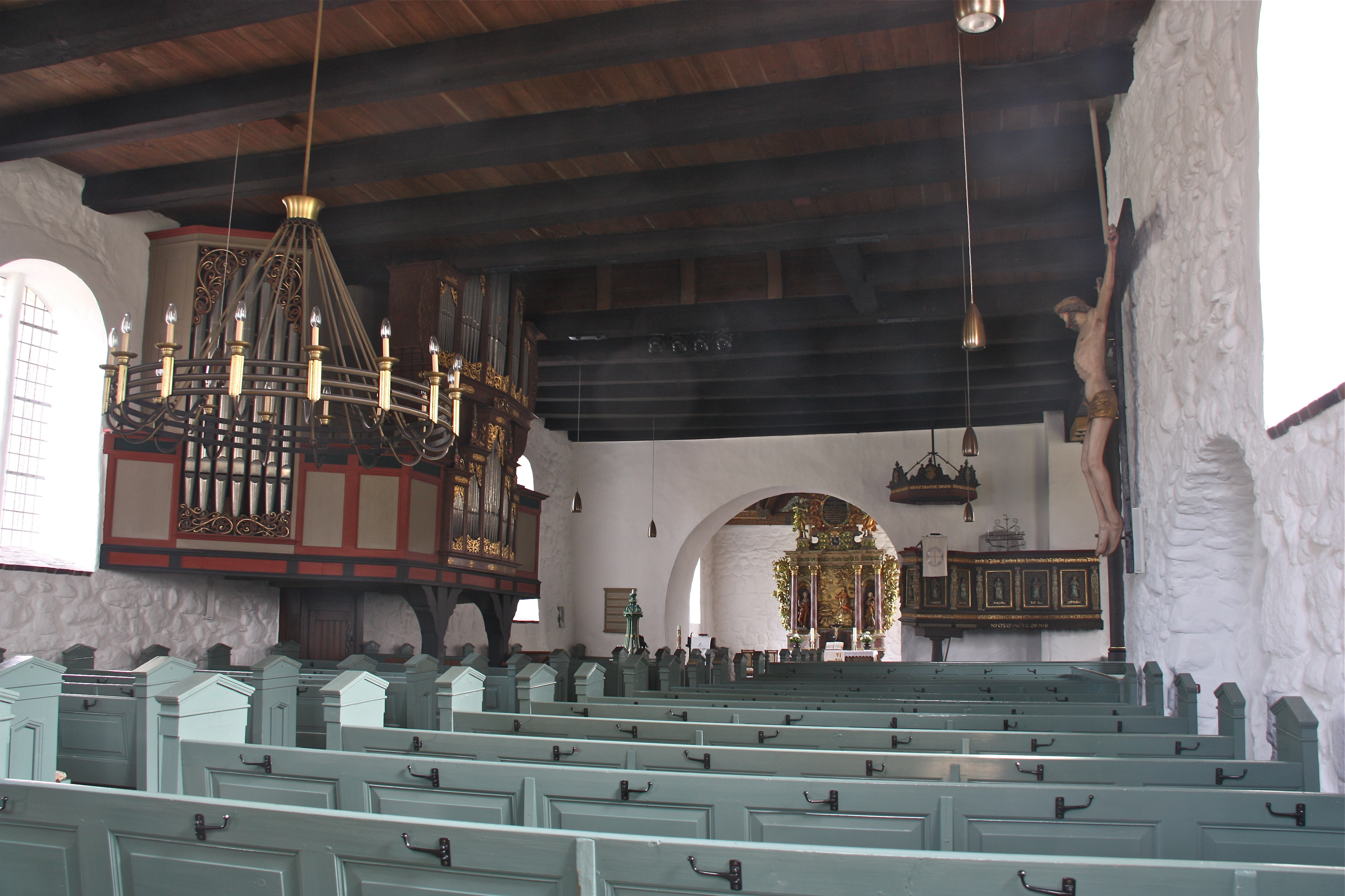 Dithmarschen, Tellingstedt, Kirche St. Martin, Innenraum, Blick nach Osten